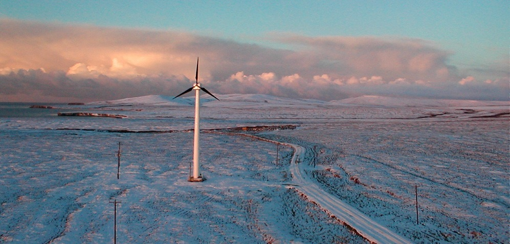 Wind turbine in Toksook Bay, Alaska.